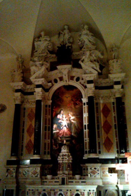 La chiesa di Santa Caterina d'Alessandria a Padova.